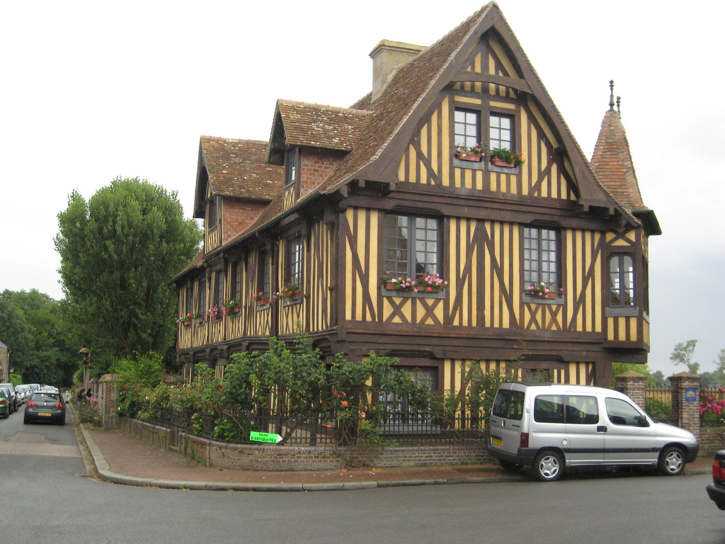 Manoir du XVe siècle à Beuvron-en-Auge (Calvados, France)